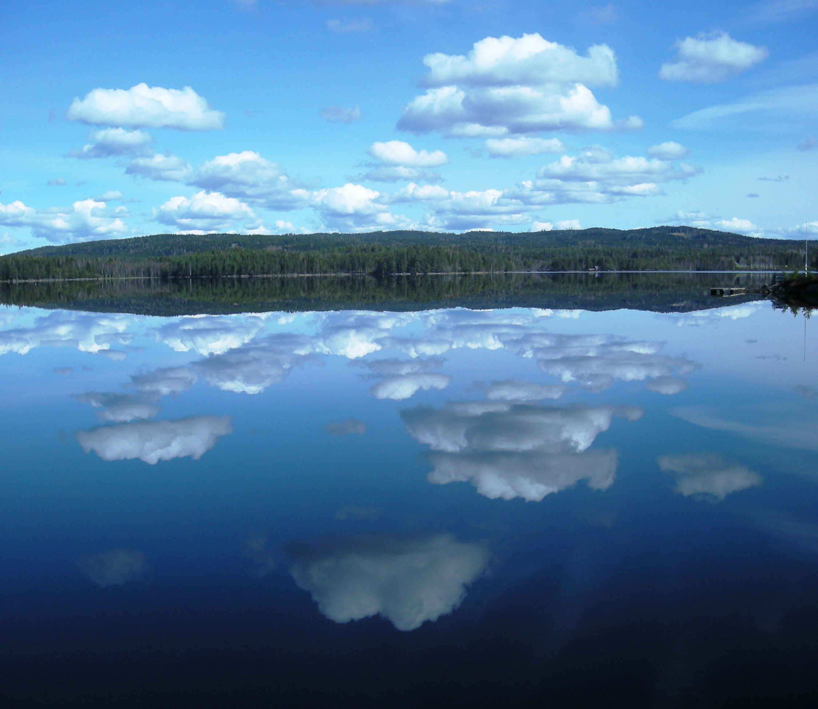 Øysjøen i Eidskog (Aurskog-Høland ved bortre bredd)